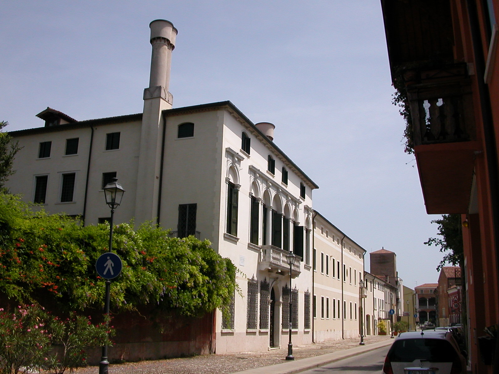 Ca' Dolfin, Lendinara, Provincia di Rovigo.